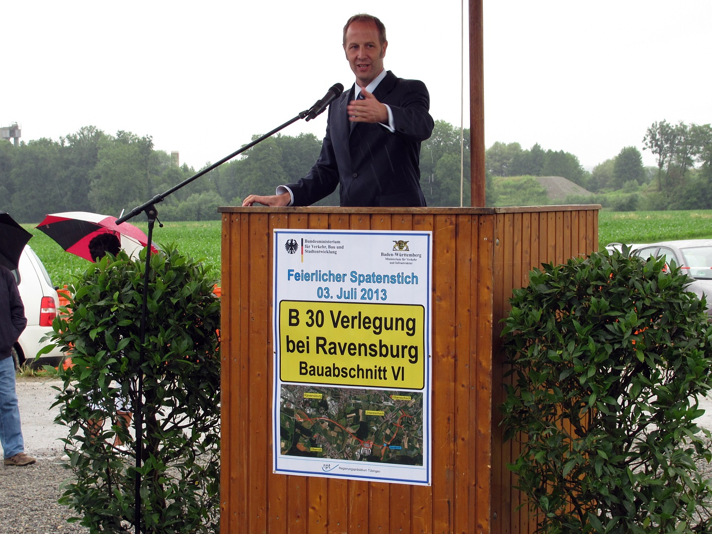 Spatenstich für Bauabschnitt VI der Ortsumgehung Ravensburg ("B 30-Süd" am 03. Juli 2013. Ansprache: Dr. Daniel Rapp, Oberbürgermeister Ravensburg.